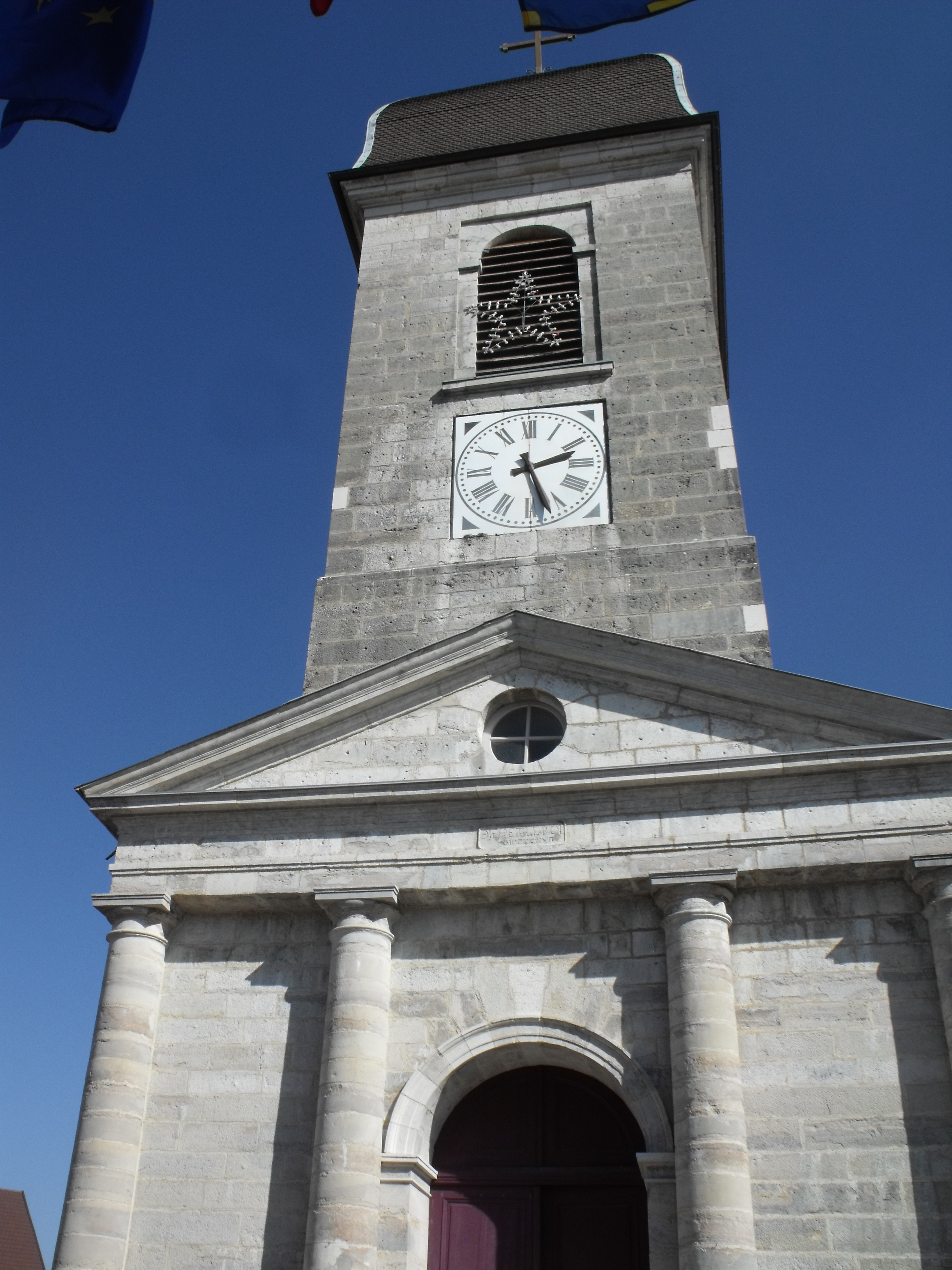 Église Saint-Martin de Sancey-l'Église, Sancey-le-Grand, Doubs, France